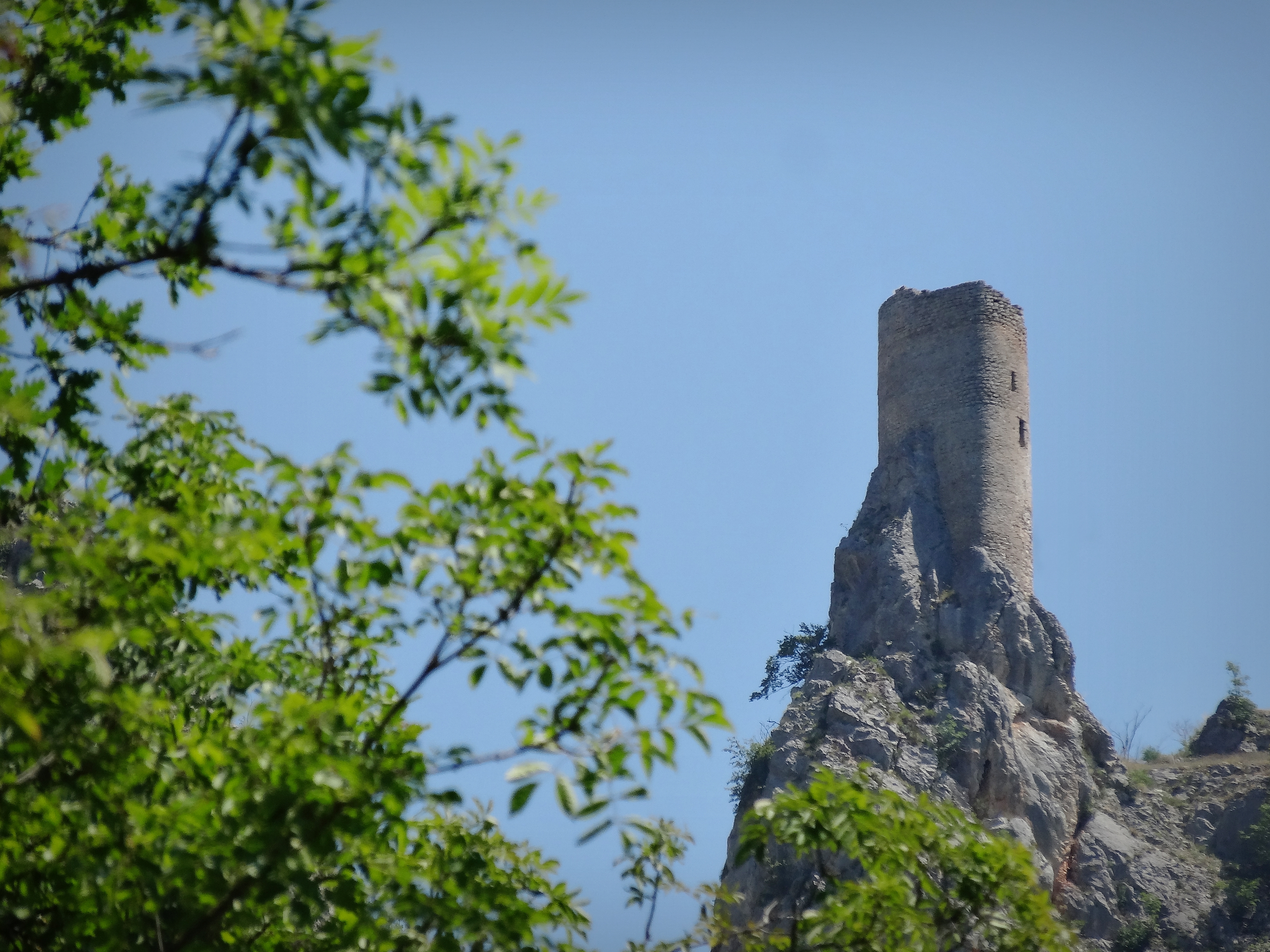 Stari grad Samobor, Novo Goražde This image was uploaded as part of Trace of Soul 2016.